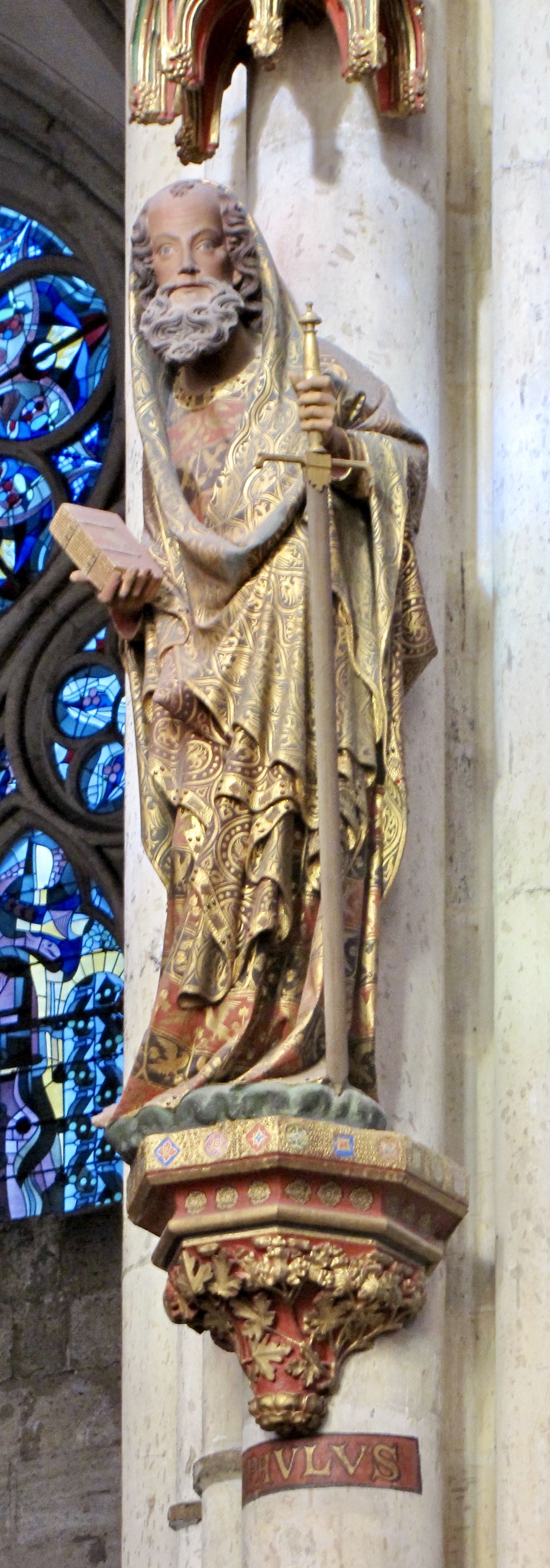 Kölner Dom: Apostel Paulus. Eine der 14 Chorpfeilerfiguren, geschaffen zwischen 1320 und 1340 von der Kölner Dombauhütte unter Leitung von Dombaumeister Johannes. Tuffstein, bunt bemalt. Höhe der Figur: 2,15 Meter. Zählt zu den Hauptwerken Europäischer Bildhauerkunst im beginnenden 14. Jhd.